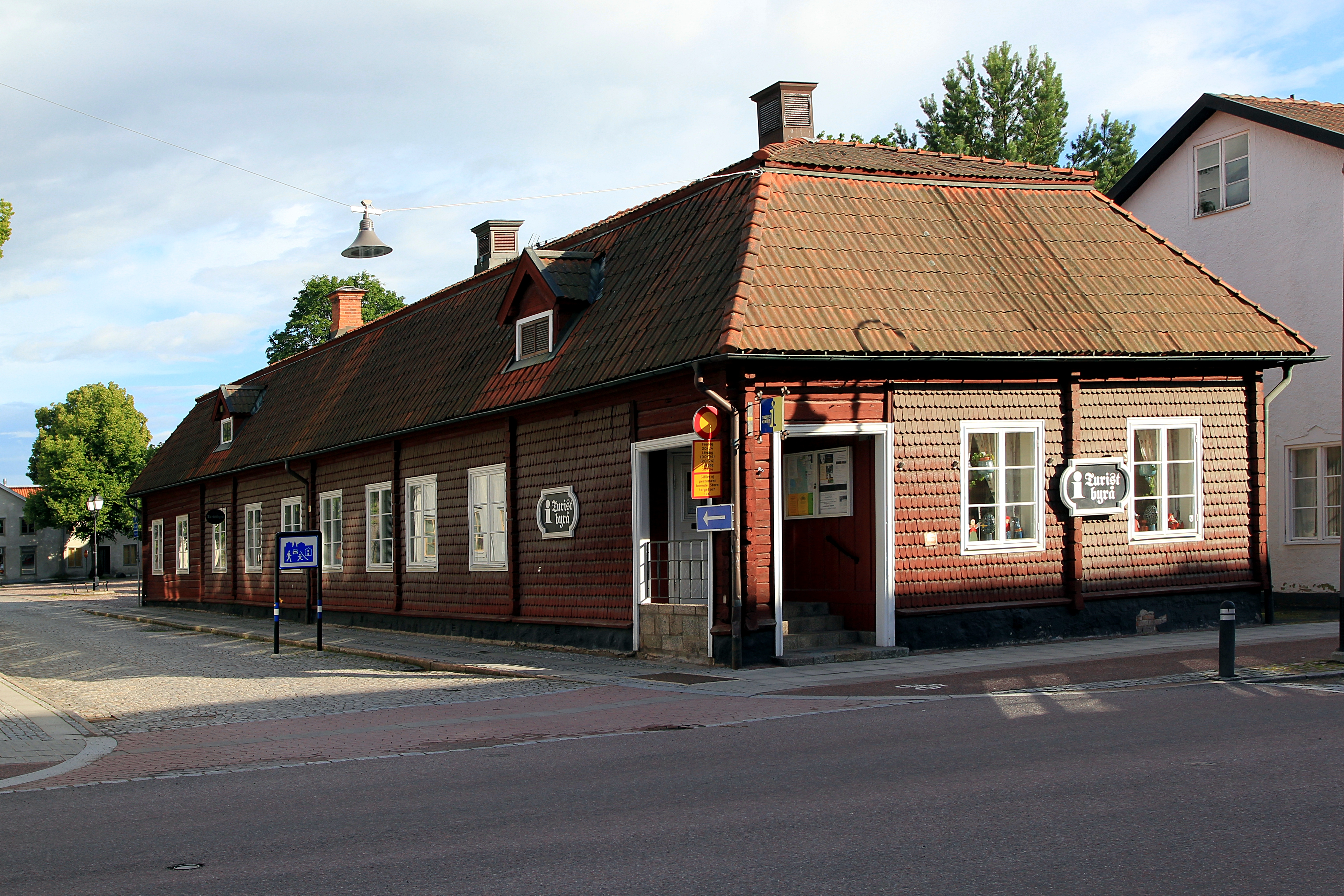 Gamla apoteket, Hedemora, Sverige